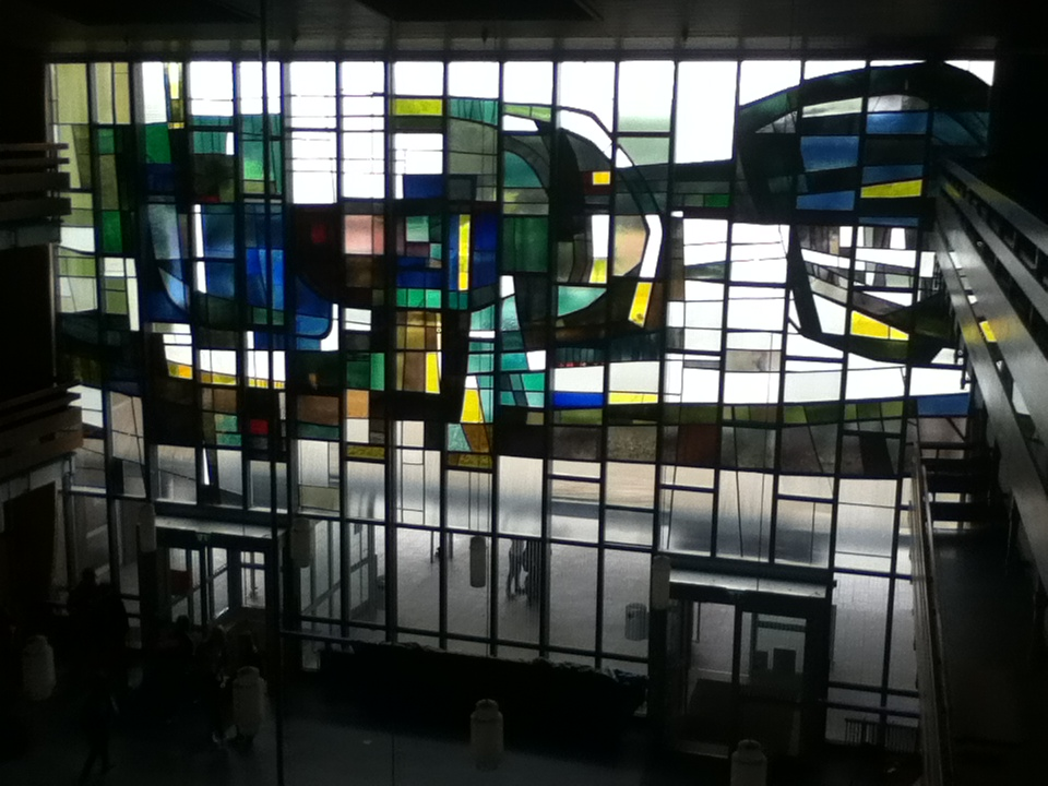 Johanneum Glasfenster des Neubaus